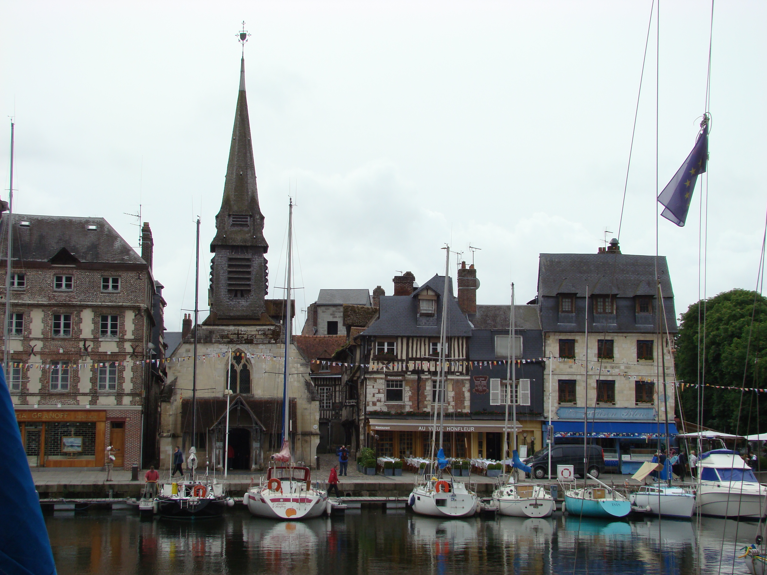 Église Saint-Étienne, Honfleur (Normandy)